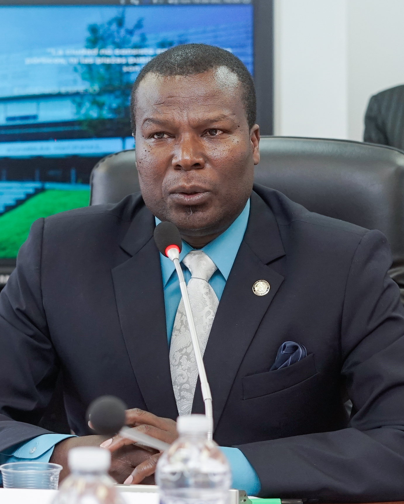 DER-COLECT-11